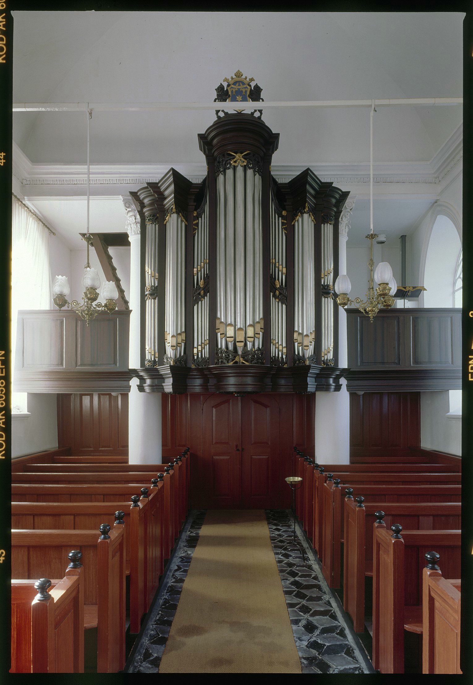 Voormalige Hervormde kerk: Interieur, aanzicht orgel, orgelnummer 232 (opmerking: Gefotografeerd voor Het Historische Orgel in Nederland 1840-1849, bladzijde 367)